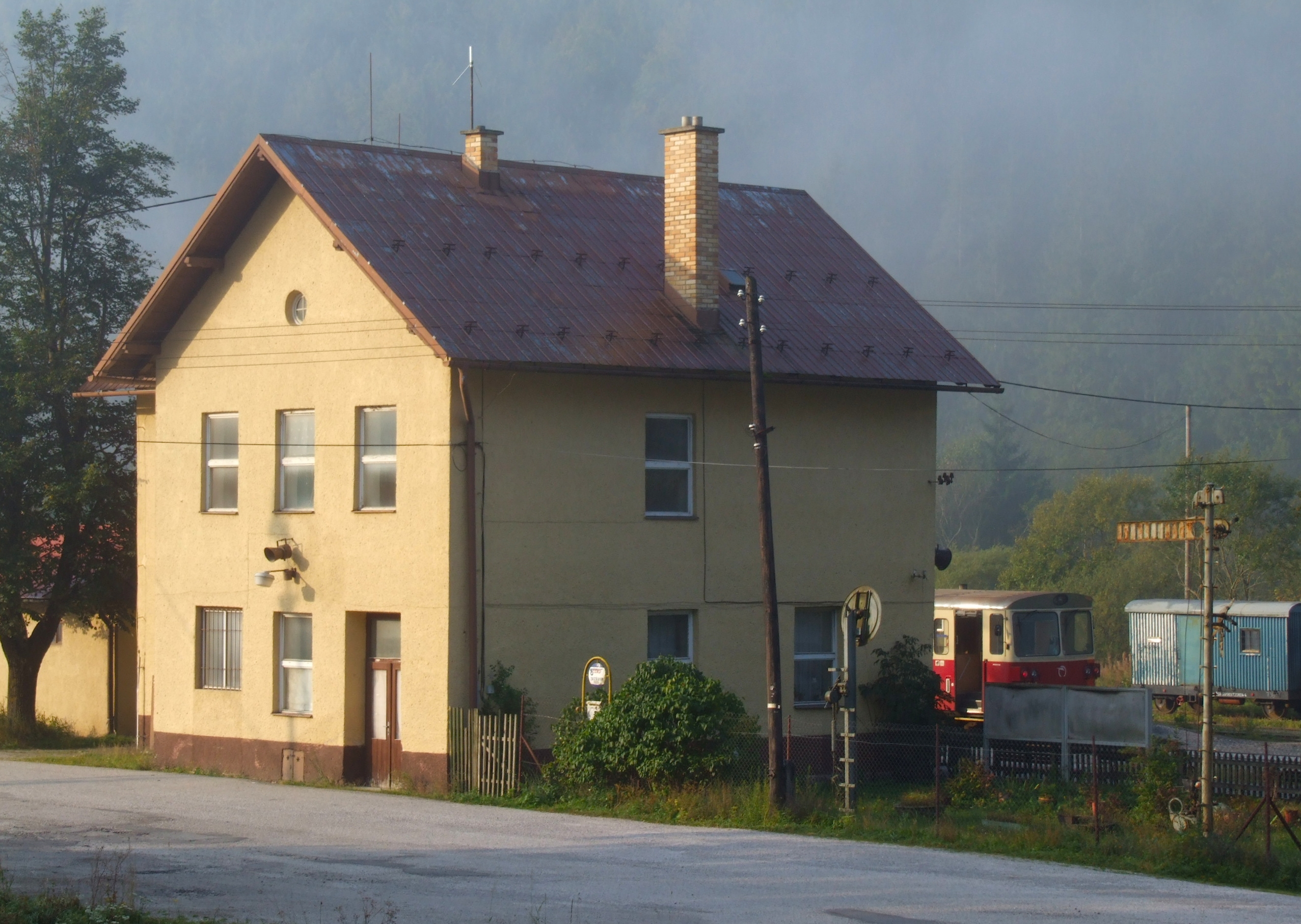 Červená Skala - železniční stanice